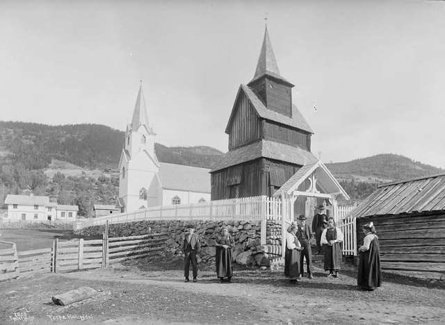 Torpo stavkyrkje (Torpo stave church, Torpo, Ål kommune, Buskerud fylke, Norway). Picture taken in the periode 1880 - 1890.